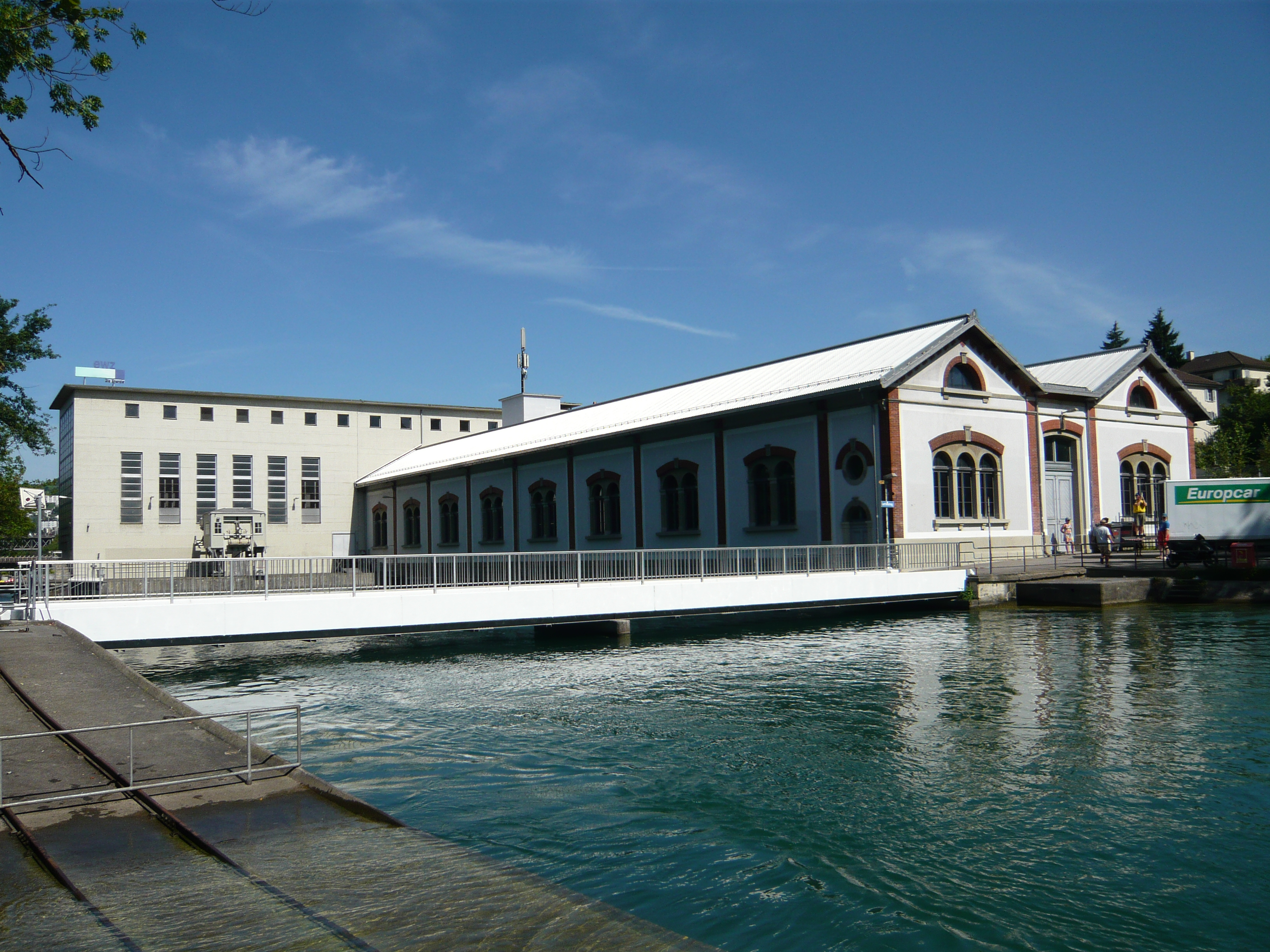 Altes Wasserkraftwerk (oder Limmatwerk) Letten